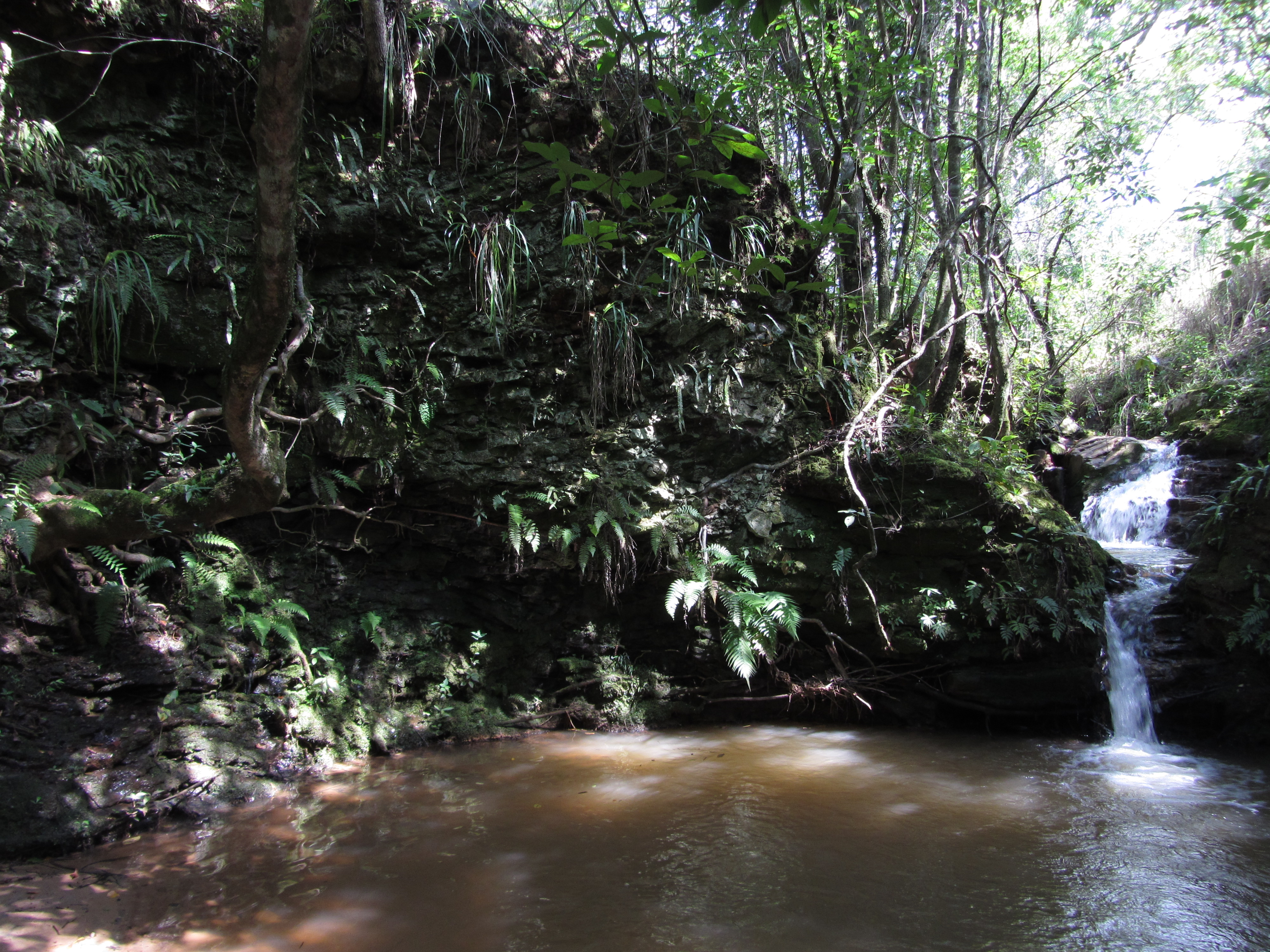 Cachoeira em meio ao cerrado do Parque Estadual Furnas do Bom Jesus